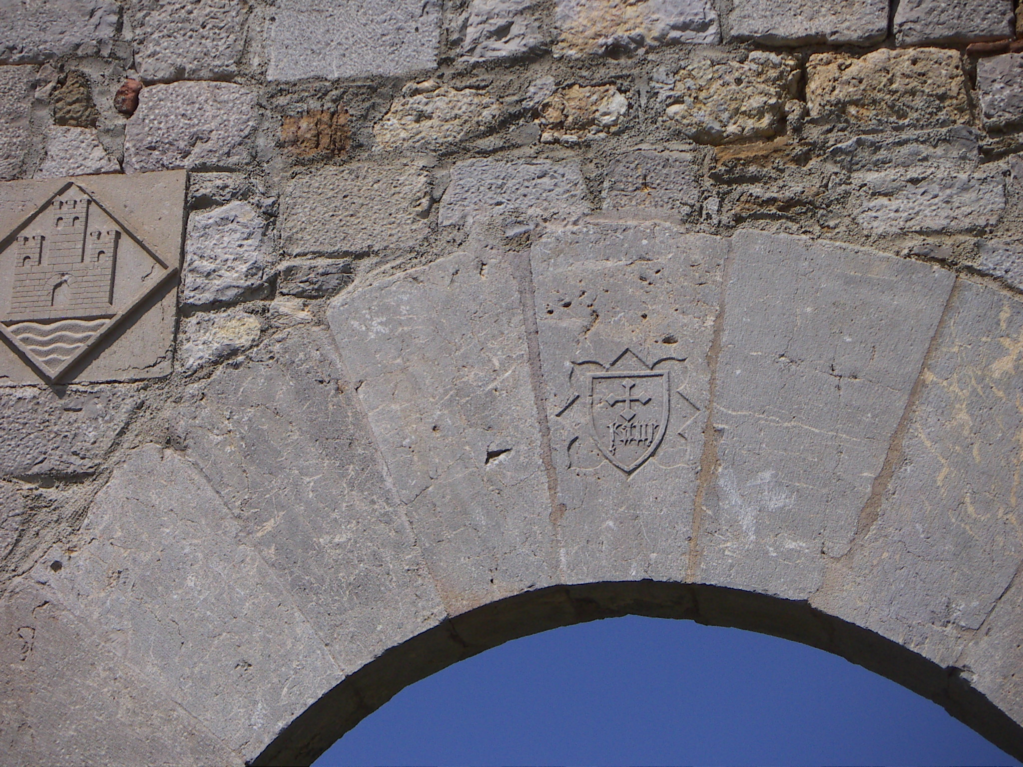 escuts a Santa Maria del Roure a Pont de Molins